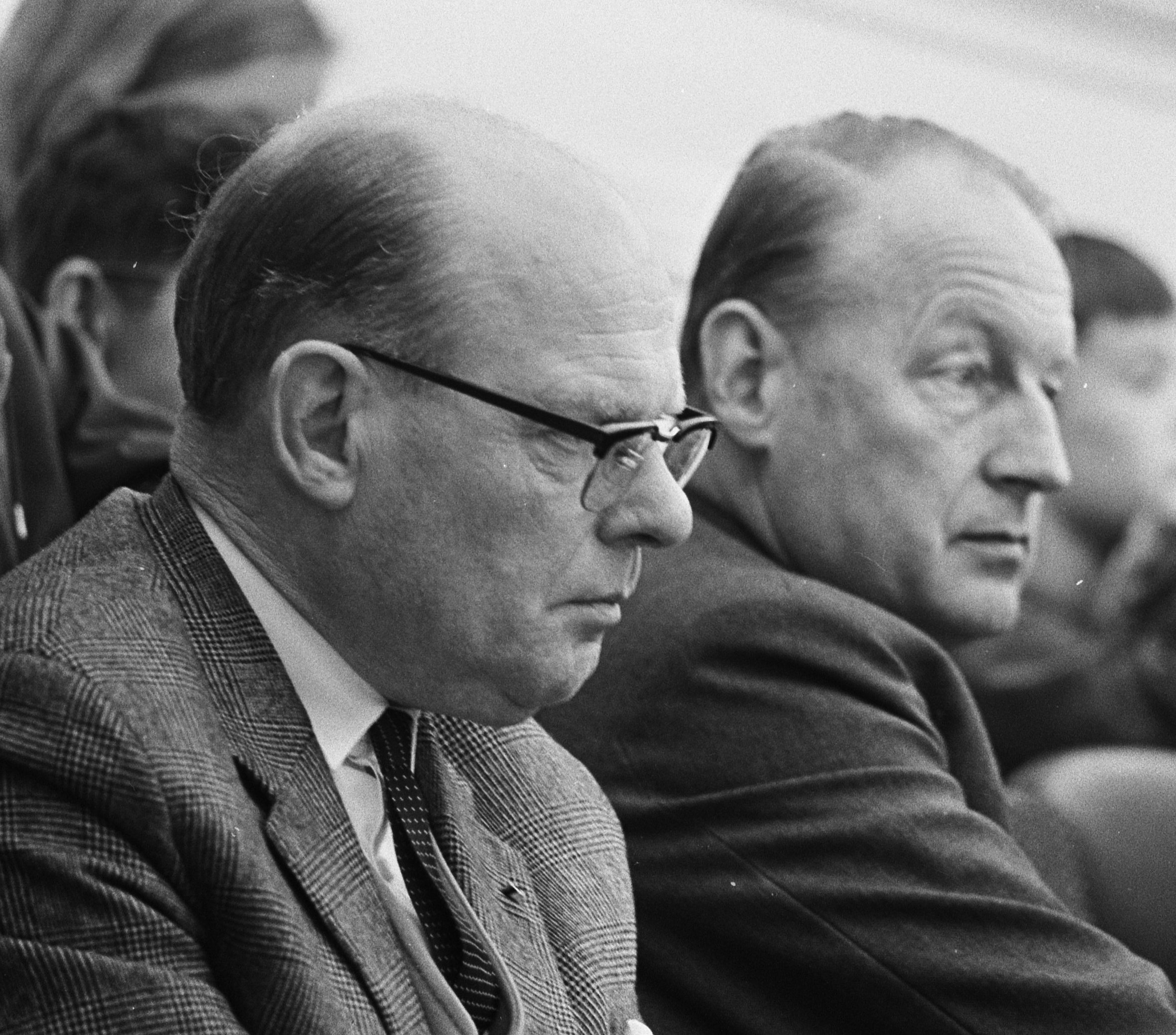 Collectie / Archief : Fotocollectie Anefo Reportage / Serie : Tweede Kamer, debat over de werkgelegenheid Beschrijving : Op de tribune links burgemeester A.J. Vleer (Enschede) en rechts burgemeester H. Rijpstra (Almelo) Datum : 13 juni 1967 Trefwoorden : burgemeesters, regeringen, regeringsbeleid, sociaal beleid, werkgelegenheid, werkgelegenheidsbeleid Persoonsnaam : Rijpstra, H., Vleer, A.J. Fotograaf : Fotograaf Onbekend / Anefo Auteursrechthebbende : Nationaal Archief Materiaalsoort : Negatief (zwart/wit) Nummer archiefinventaris : bekijk toegang 2.24.01.05 Bestanddeelnummer : 920-4058